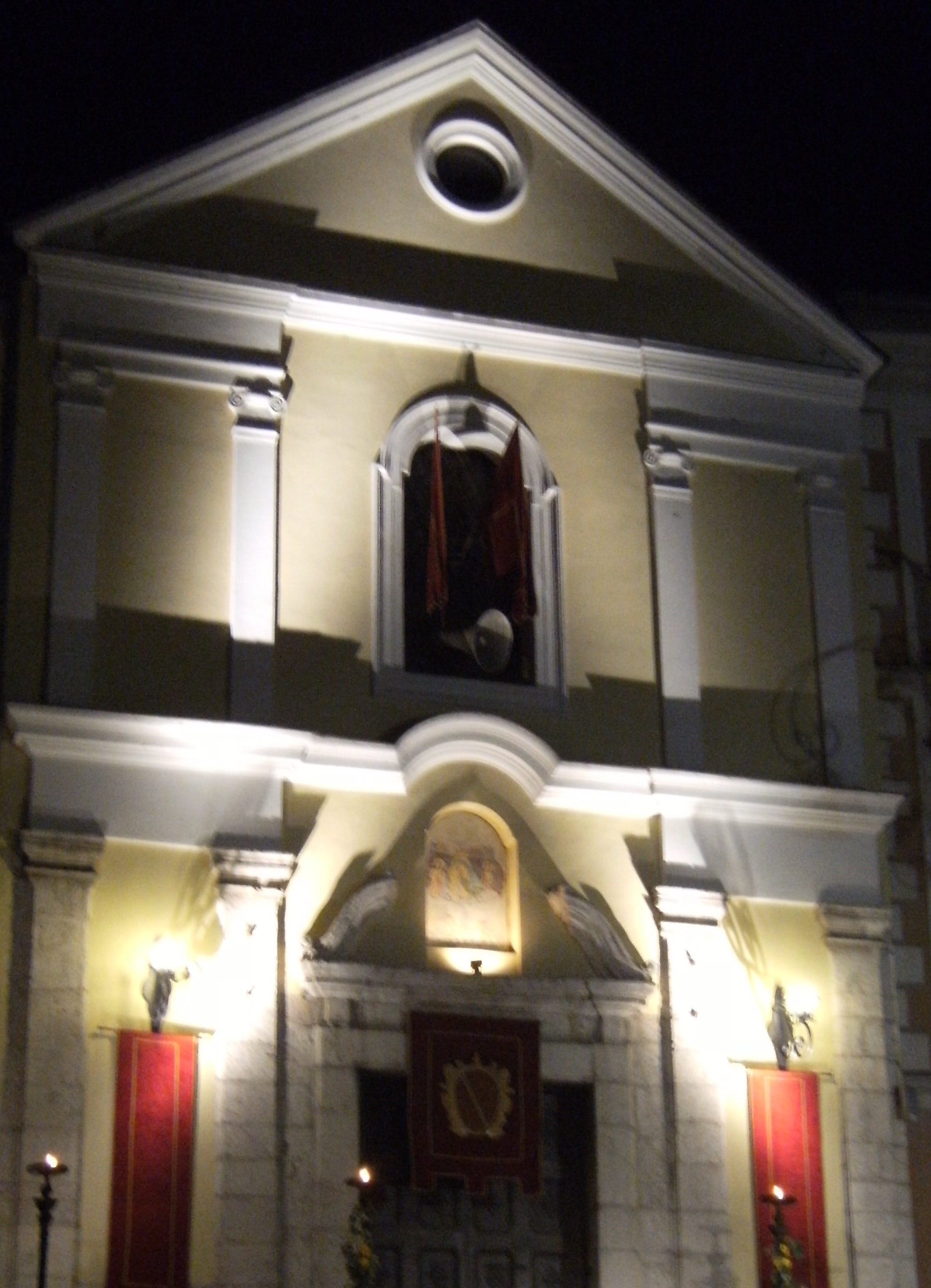 Chiesa di Santa Maria di Costantinopoli di Avellino in occasione del Palio della Botte 2014